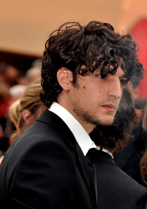 Louis Garrel au festival de Cannes